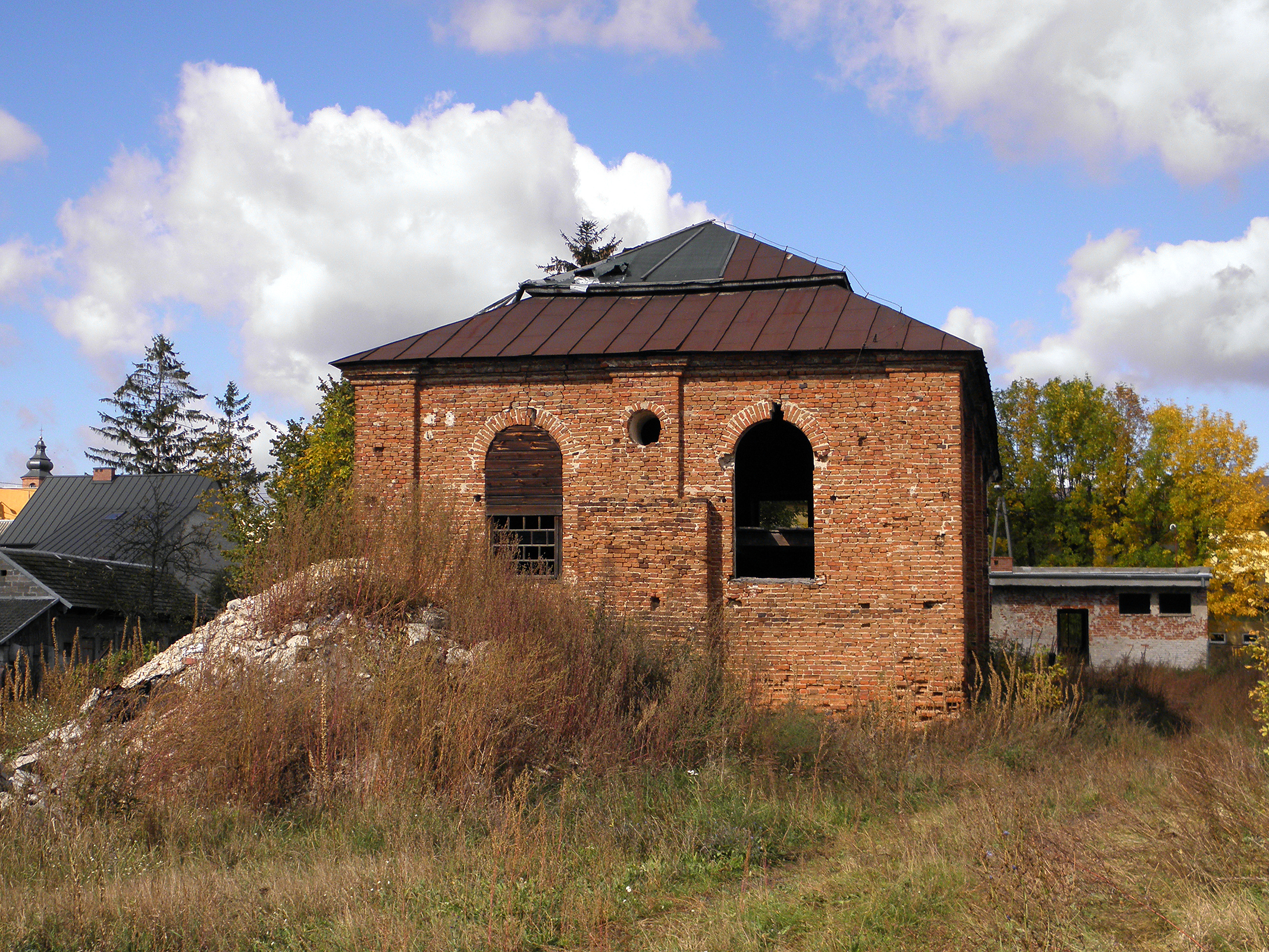 Budynek synagogi w Ciepielowie.